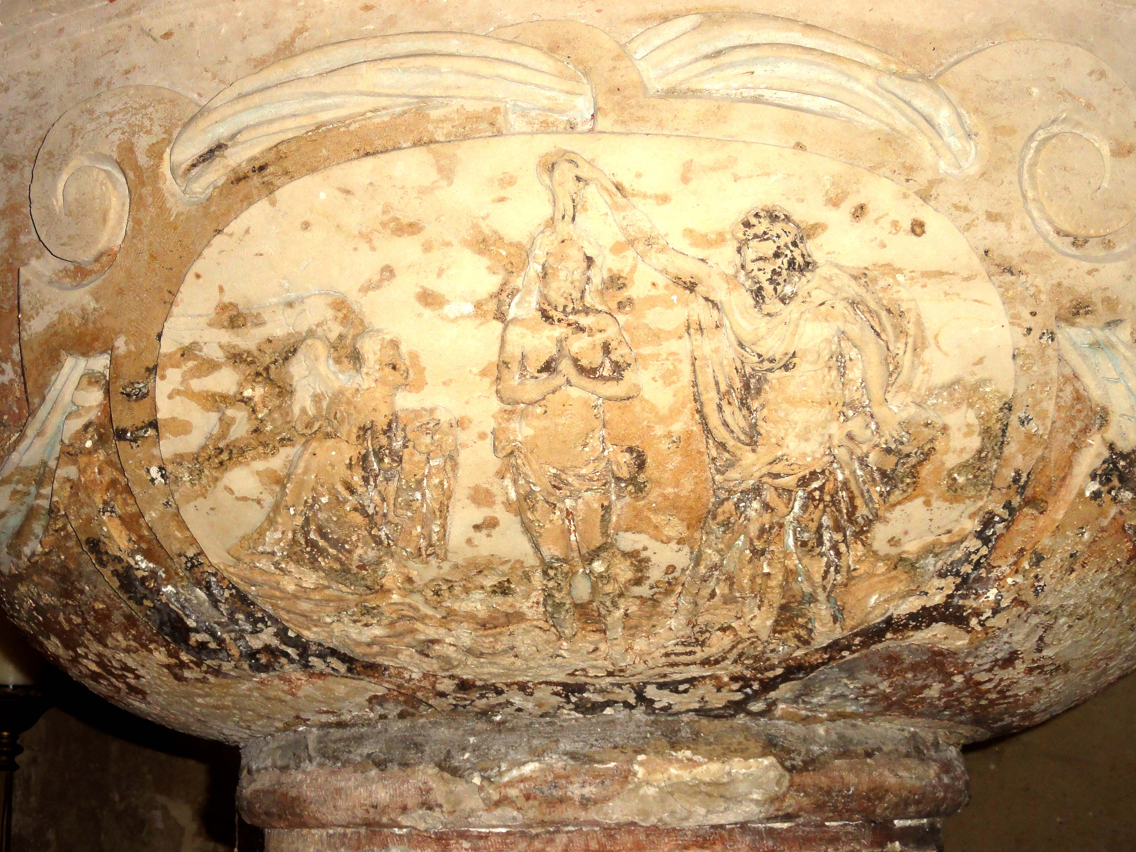 Mobilier de l'église - voir titre.